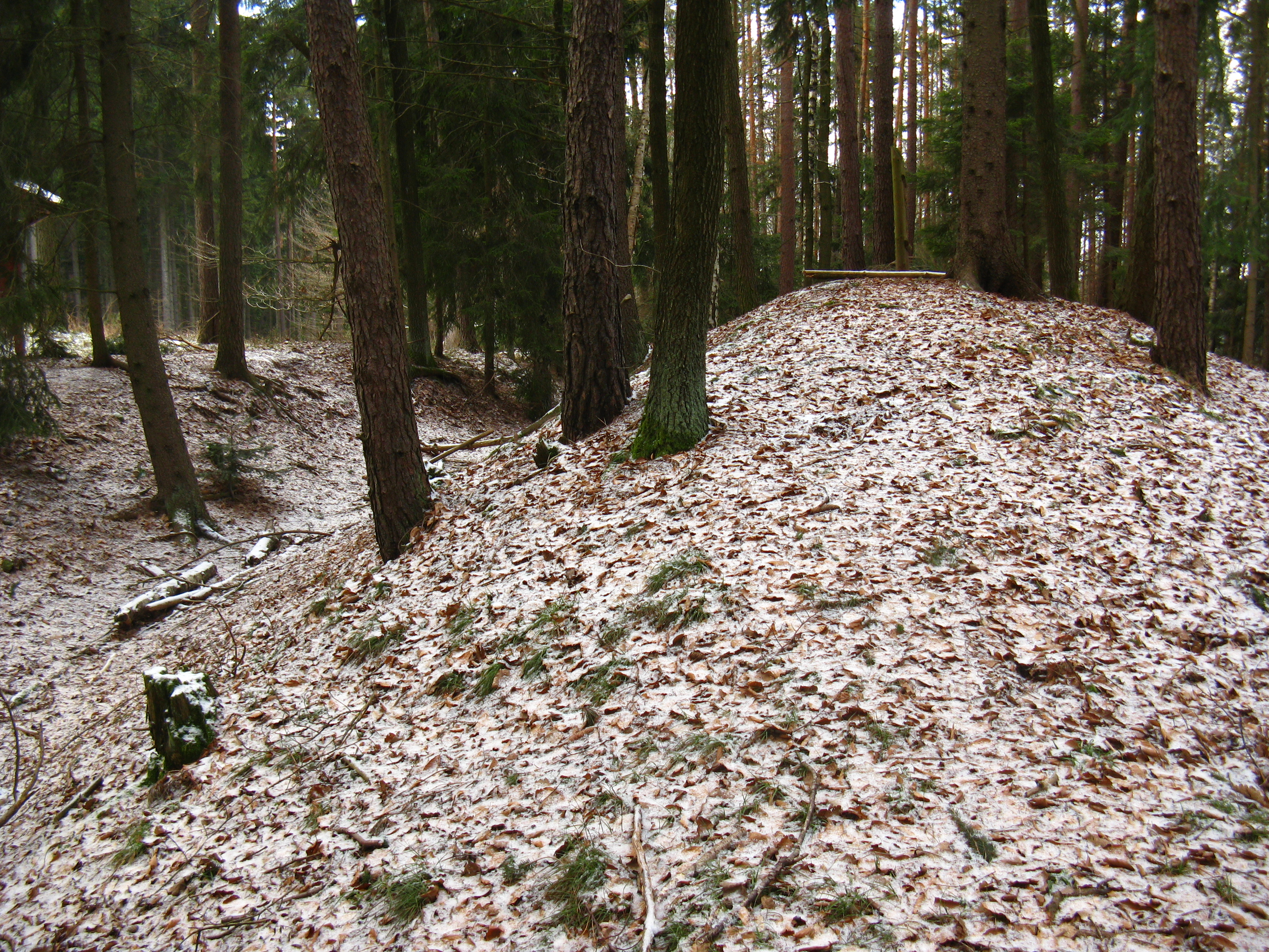 Reste des Burgwalls Osterwiese, Heidenberg, Landkreis Roth, Mittelfranken, Bayern; Aufnahme in Richtung Nordwest